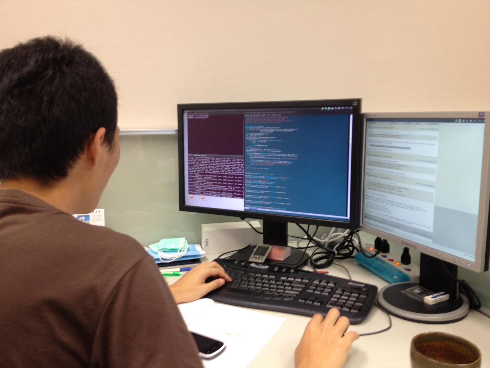 Инженер в тайваньском офисе Мозиллы